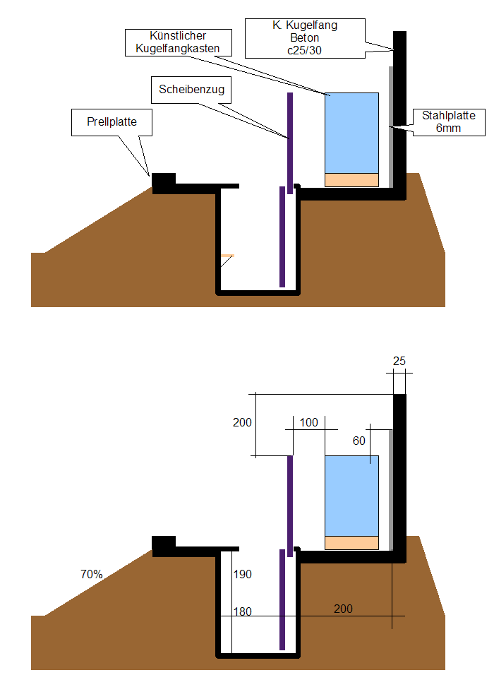 Querschnitt eines 300m-Scheibenstandes mit künstlichem Kugelfang